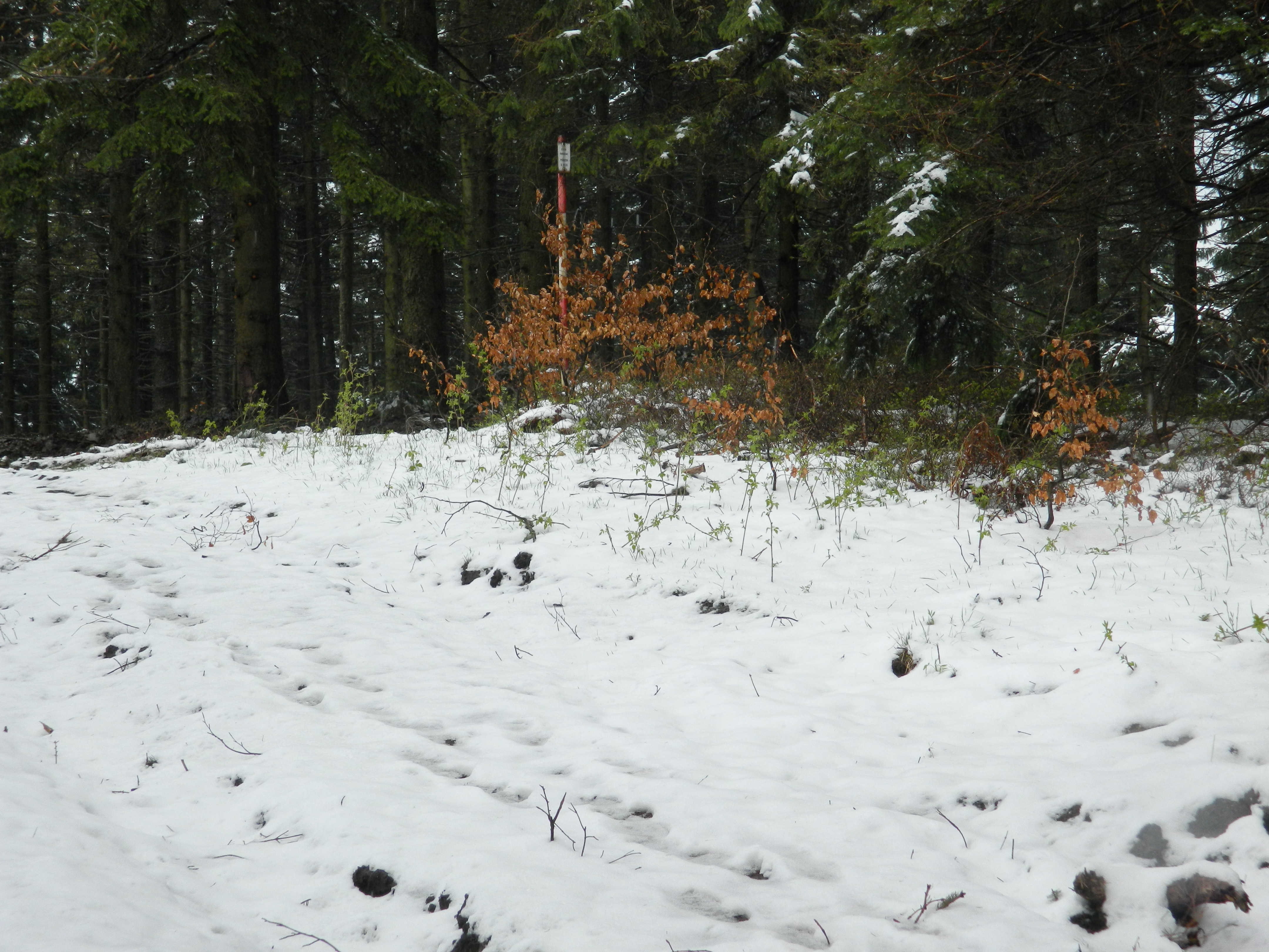 Vrchol Ropičky v Moravskoslezských Beskydech